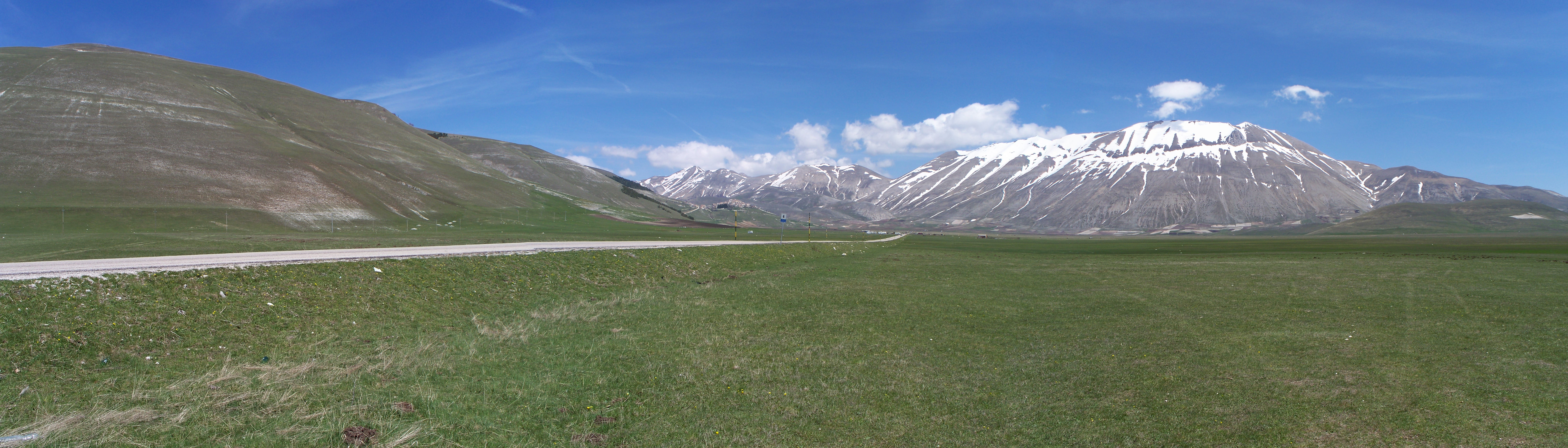 Panoramica Castelluccio